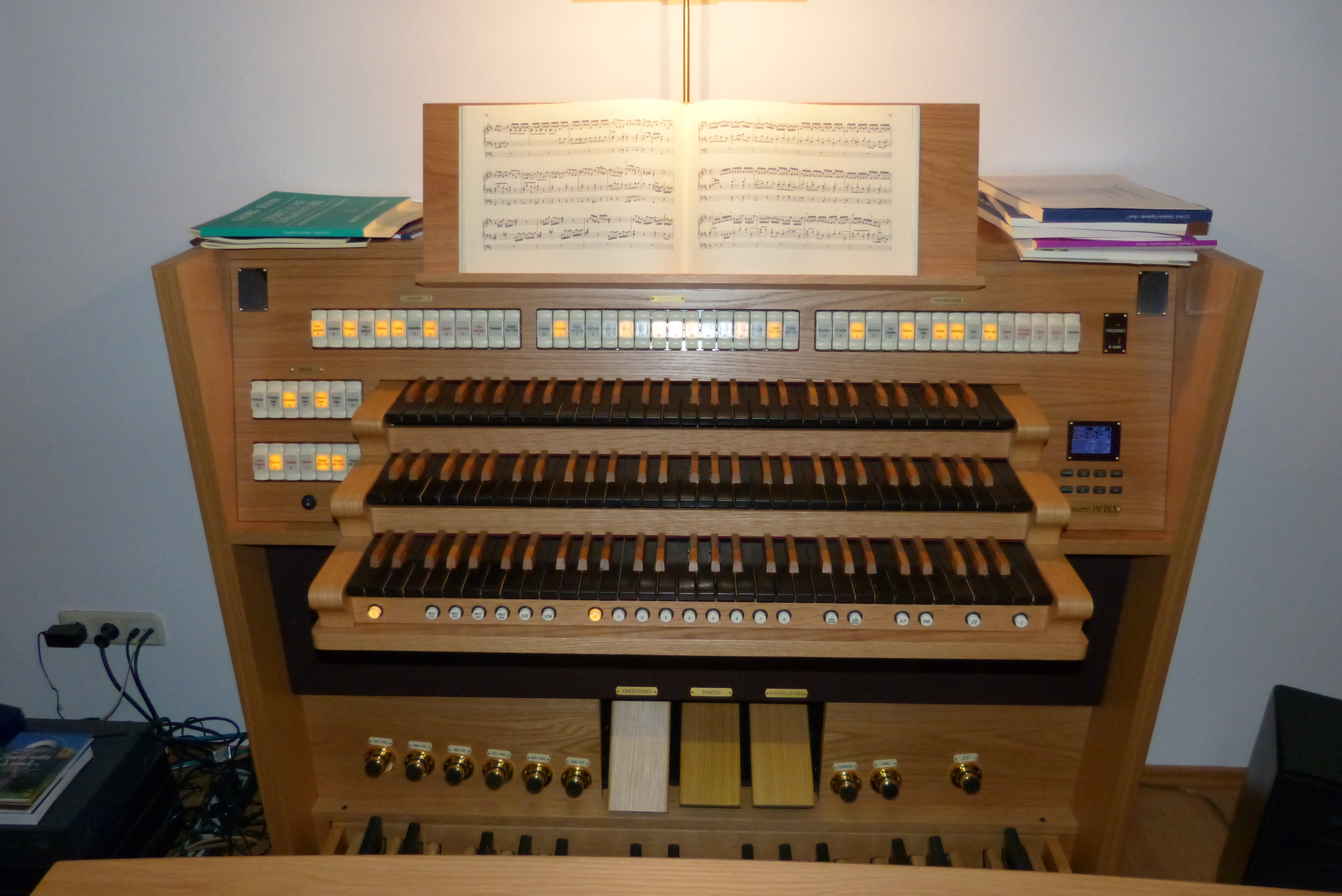 Kisselbach Concerto 350 DLX organ References Gloria Concerto 350 Trend DLX (in German). G.Kisselbach. "Die große Faszination vom Klang und der Vielfalt der Physistechnik im kompakten Gehäuse der Gloria Concerto 350 Trend DLX." (See also PDF catalog) What is Physis Technology? (in English). Viscount Classical Organs Ltd. "Physis is a computer generated physical model of an organ pipe. The model can be manipulated in just the same way as a pipe voicer would approach an organ pipe."